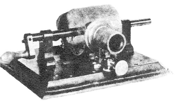 湯馬士．艾爾巴．愛迪生喺1877年時發明嘅留聲唱機。